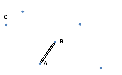 Beispielkoordinaten zum verdeutlichen der Sukzessiven Einbeziehung